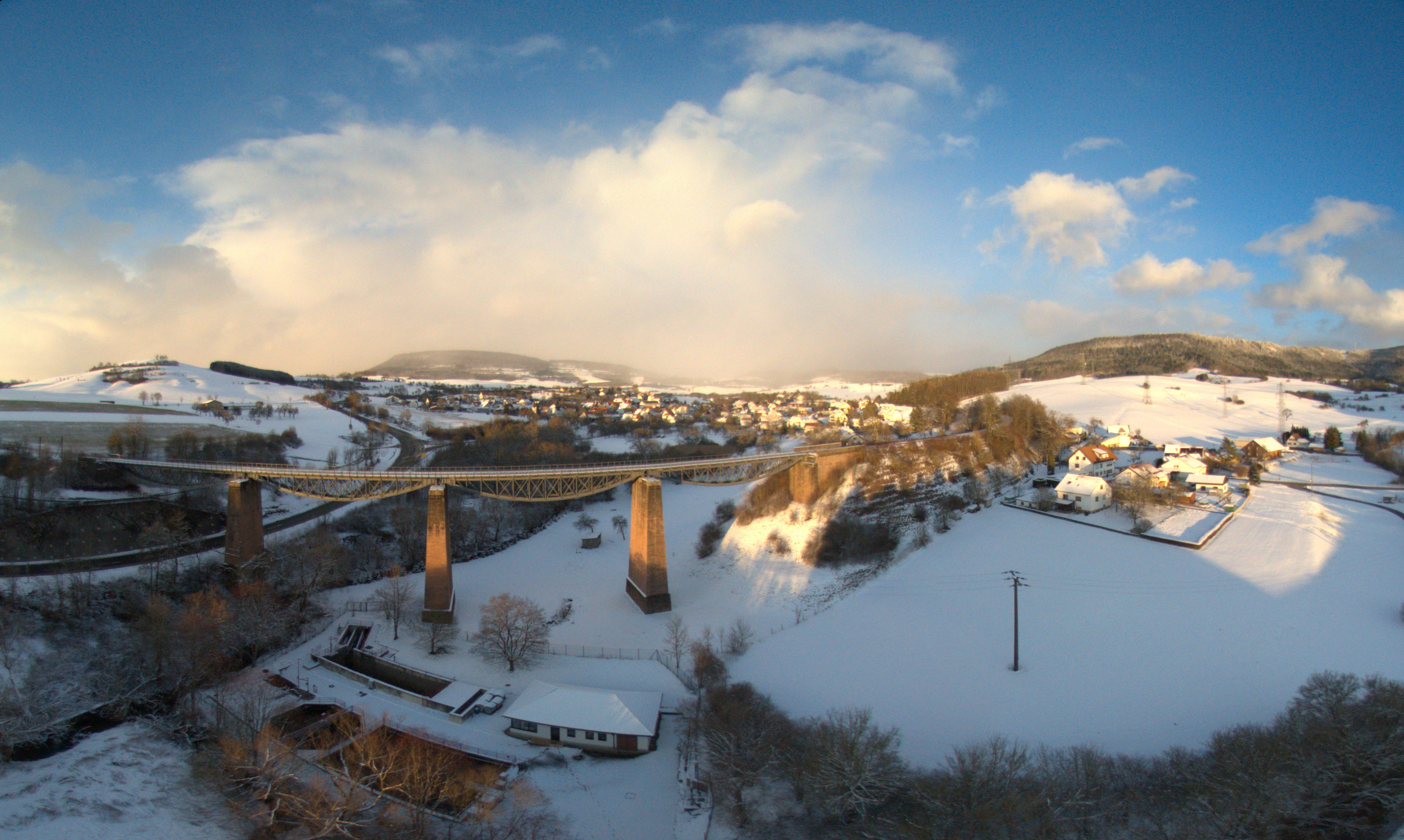 Ort Fützen und Talbrücke Fützen der Wutachtalbahn